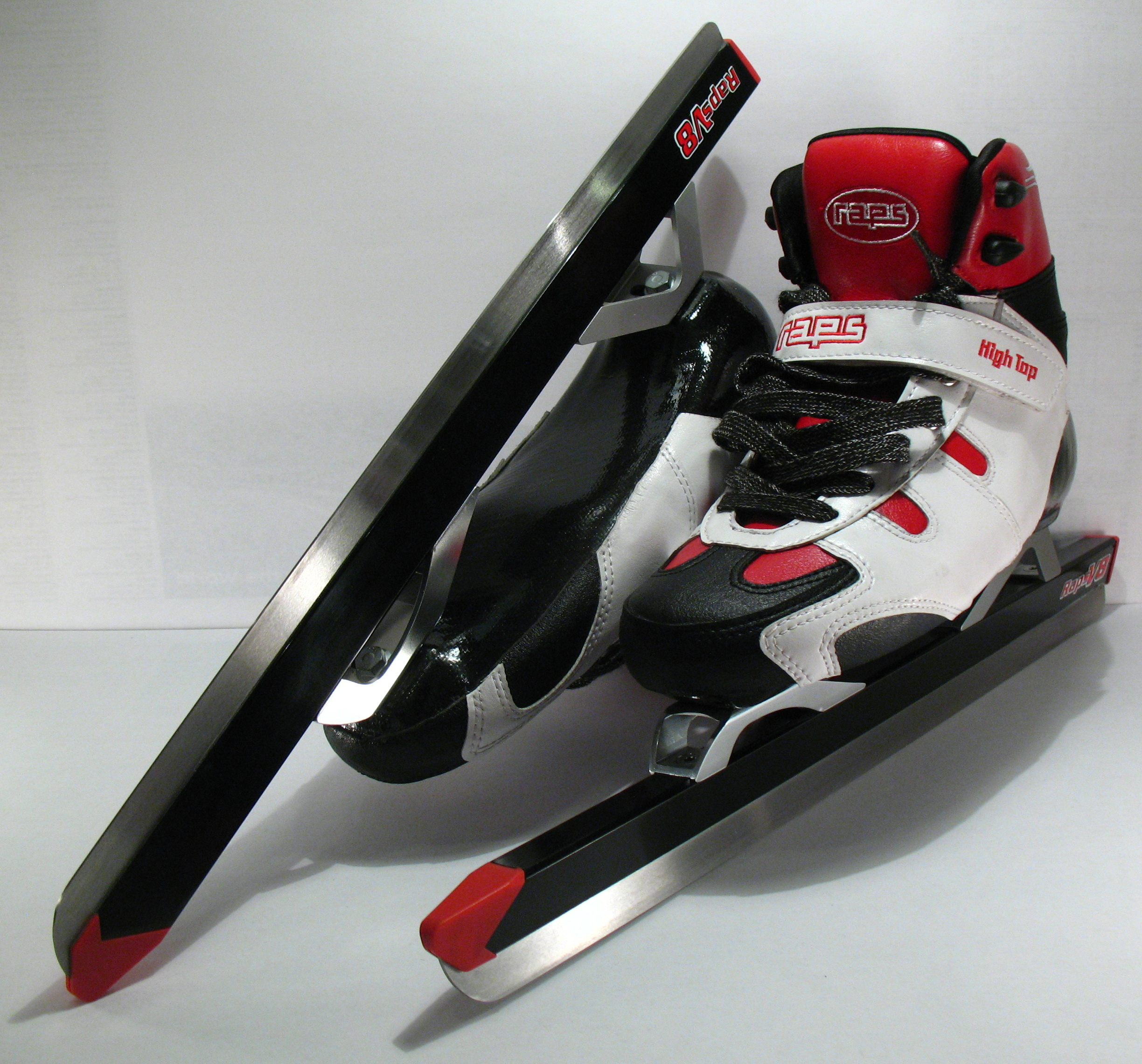 Touren-Eisschnelllaufschlittschuhe der Firma Raps